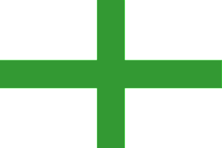 Bandiera Ordine di S. Lazzaro. I Cavallieri di San Lazzaro